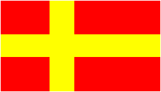 Proportions 4:2:7 - 3:2:3